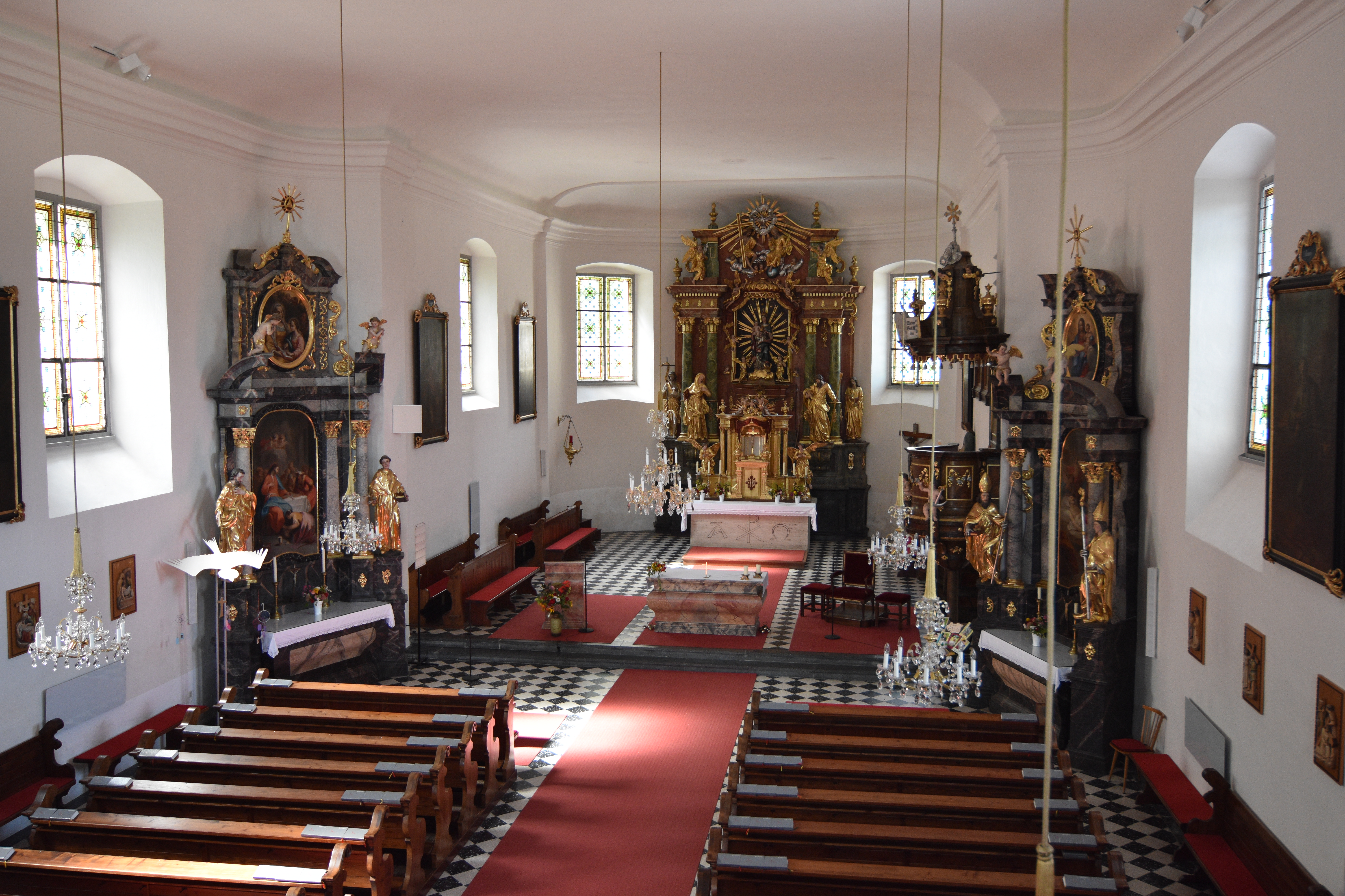 Wallfahrtskirche Maria Heilbrunn Interior